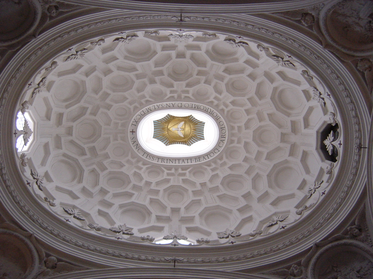 Cupola di san Carlo alle quattro fontane, del Borromini (Roma). Foto di Giovanni Dall'Orto (user:g.dallorto), marzo 2005.